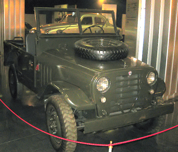 Modified from original photo: Alfa Romeo 1900M "La Matta"